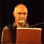 Leo Maslíah en barcelona.